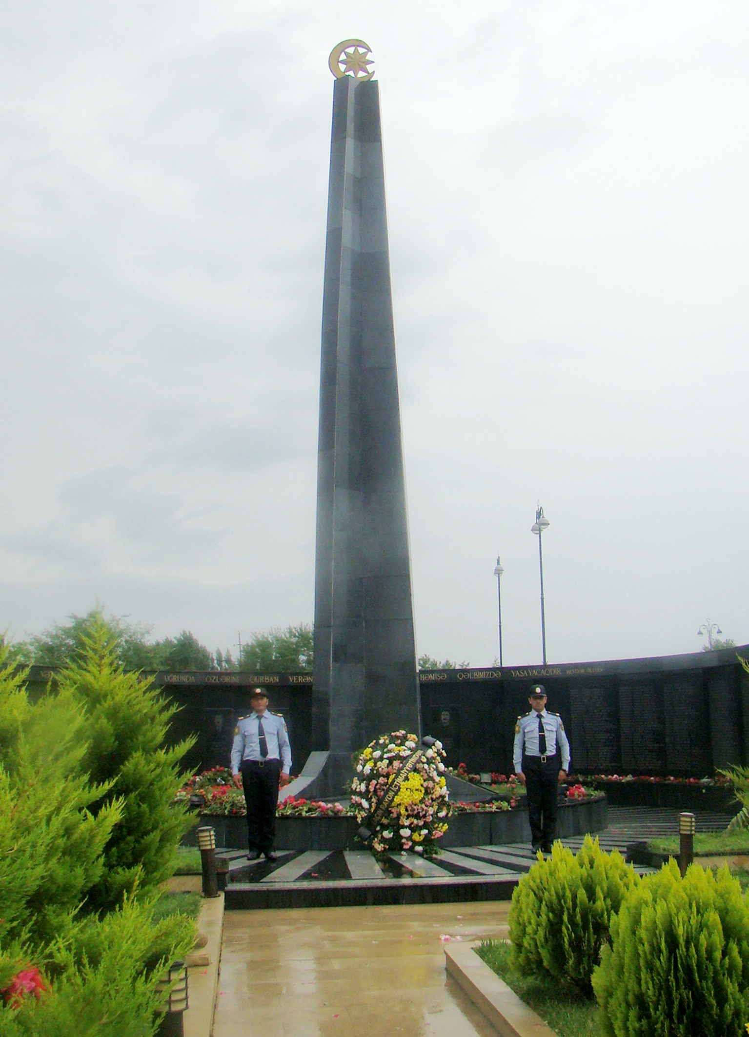 Ağcabədi rayonunun Taxtakörpü qəsəbəsində Laçın şəhidlərinin xatirəsinə ucaldılmış abidə